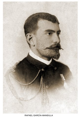 Fotografía del Capitan de Fragata Rafael García-Mansilla